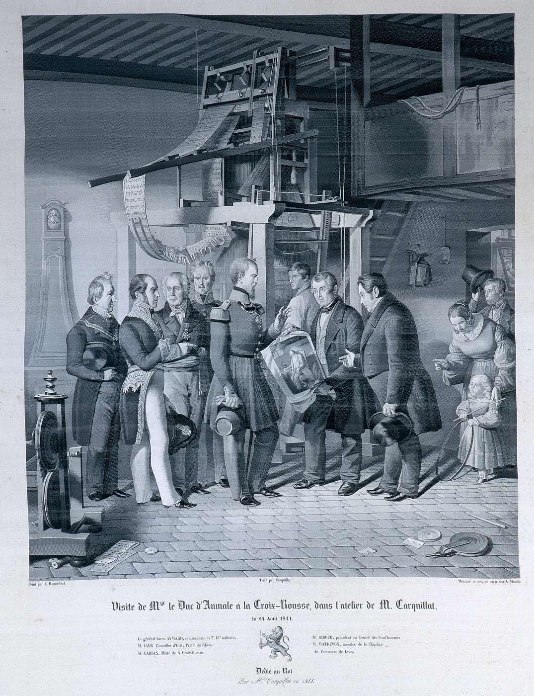 Tableau en soie broché